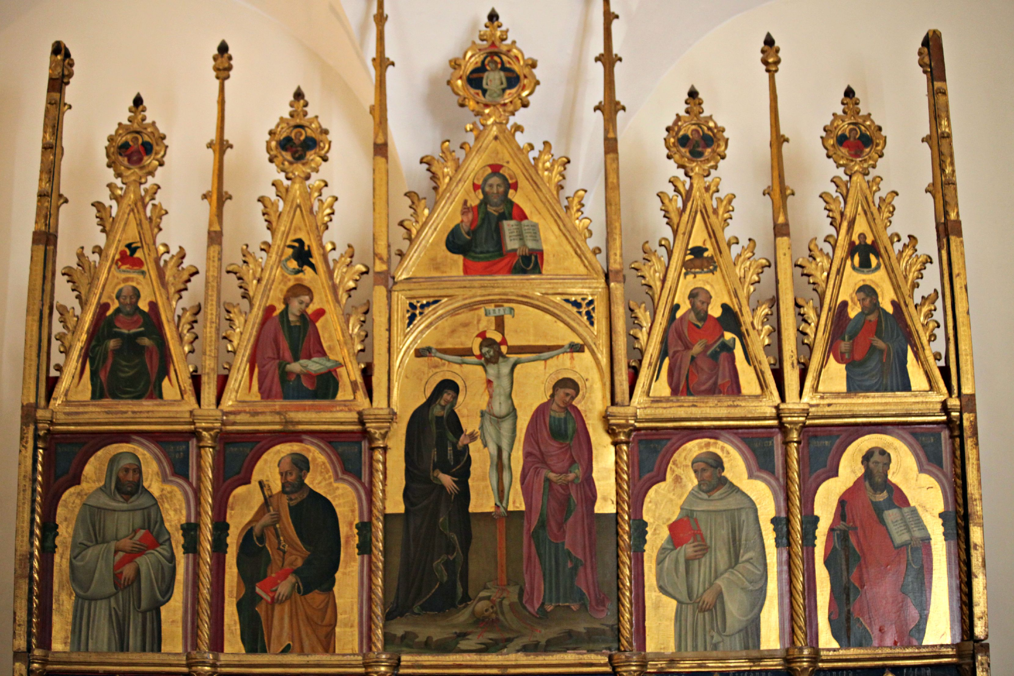 Palazzo Ducale di Urbino - Galleria Nazionale delle Marche - MIBAC This is a photo of a monument which is part of cultural heritage of Italy.